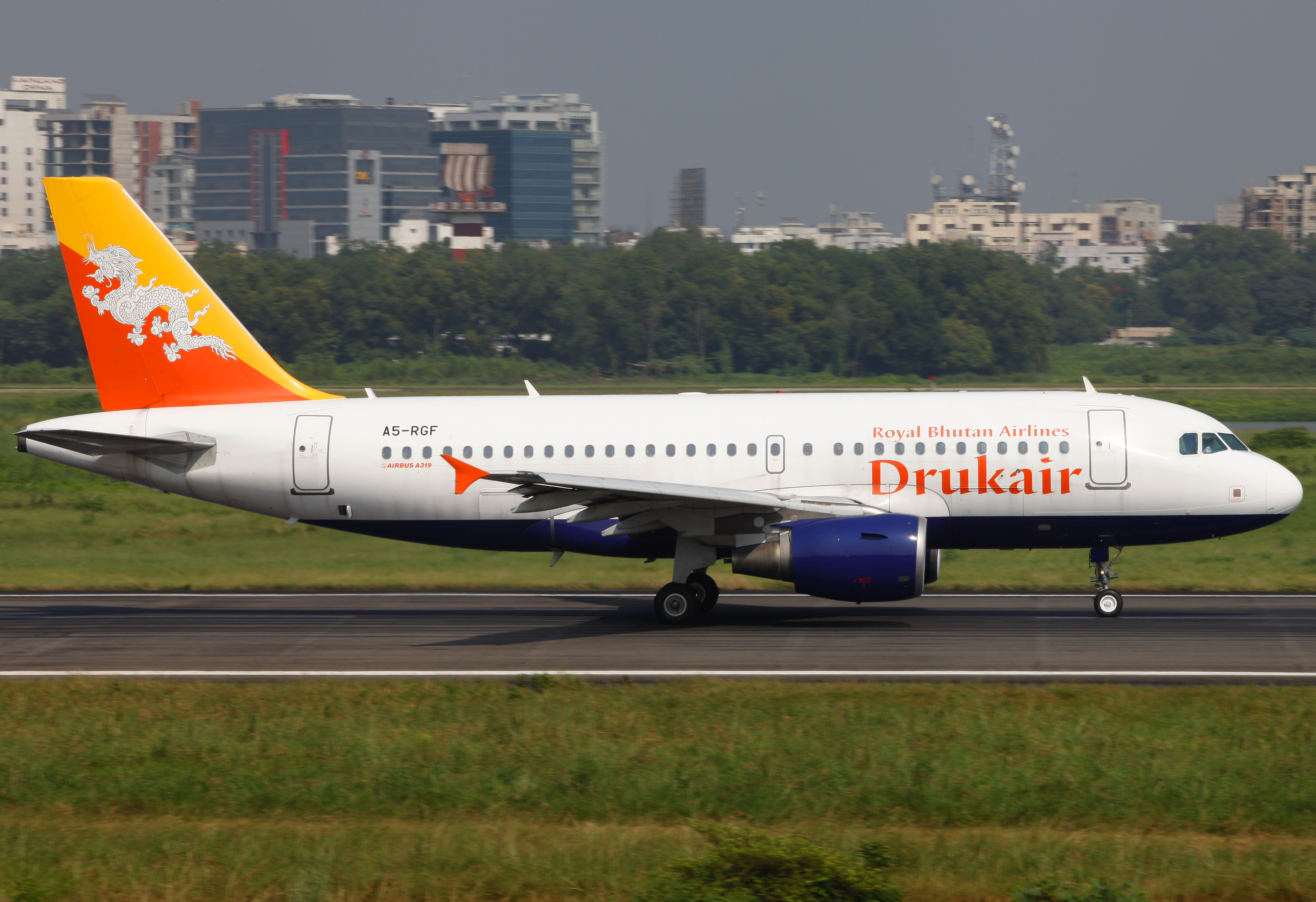 A5-RGF Airbus A319-115 Druk Air - Royal Bhutan Airlines Running for Take Off at Hazrat Shahjalal International Airport Dhaka ( DAC / VGHS )